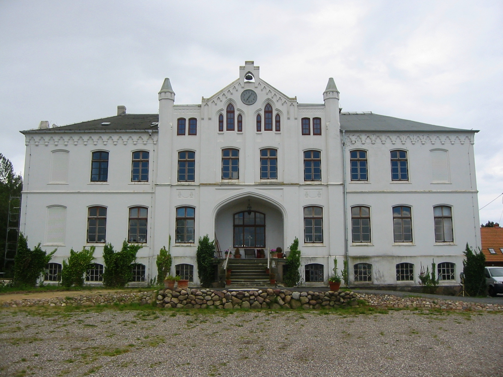 Vorderansicht des denkmalgeschützten Gutshauses in Klein Kussewitz ("Schloss K")